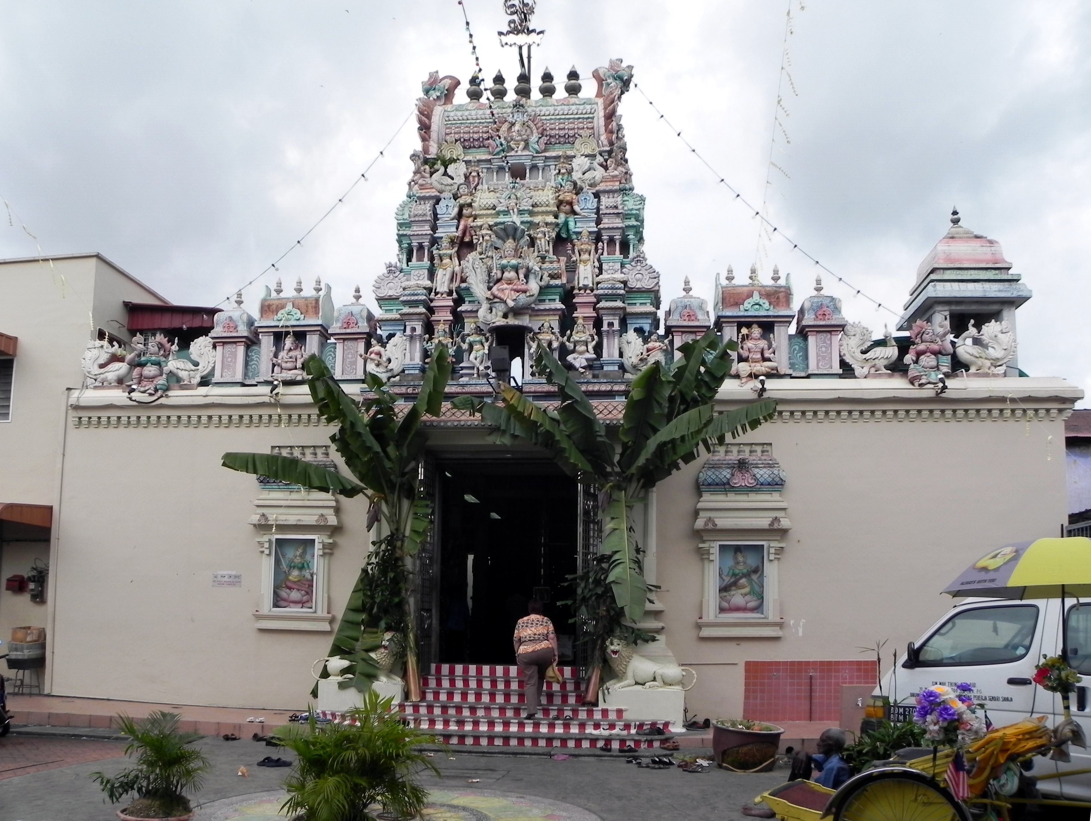 Sri Mahamariamman Tempel, Queen Street, George Town Penang (Malaysia)